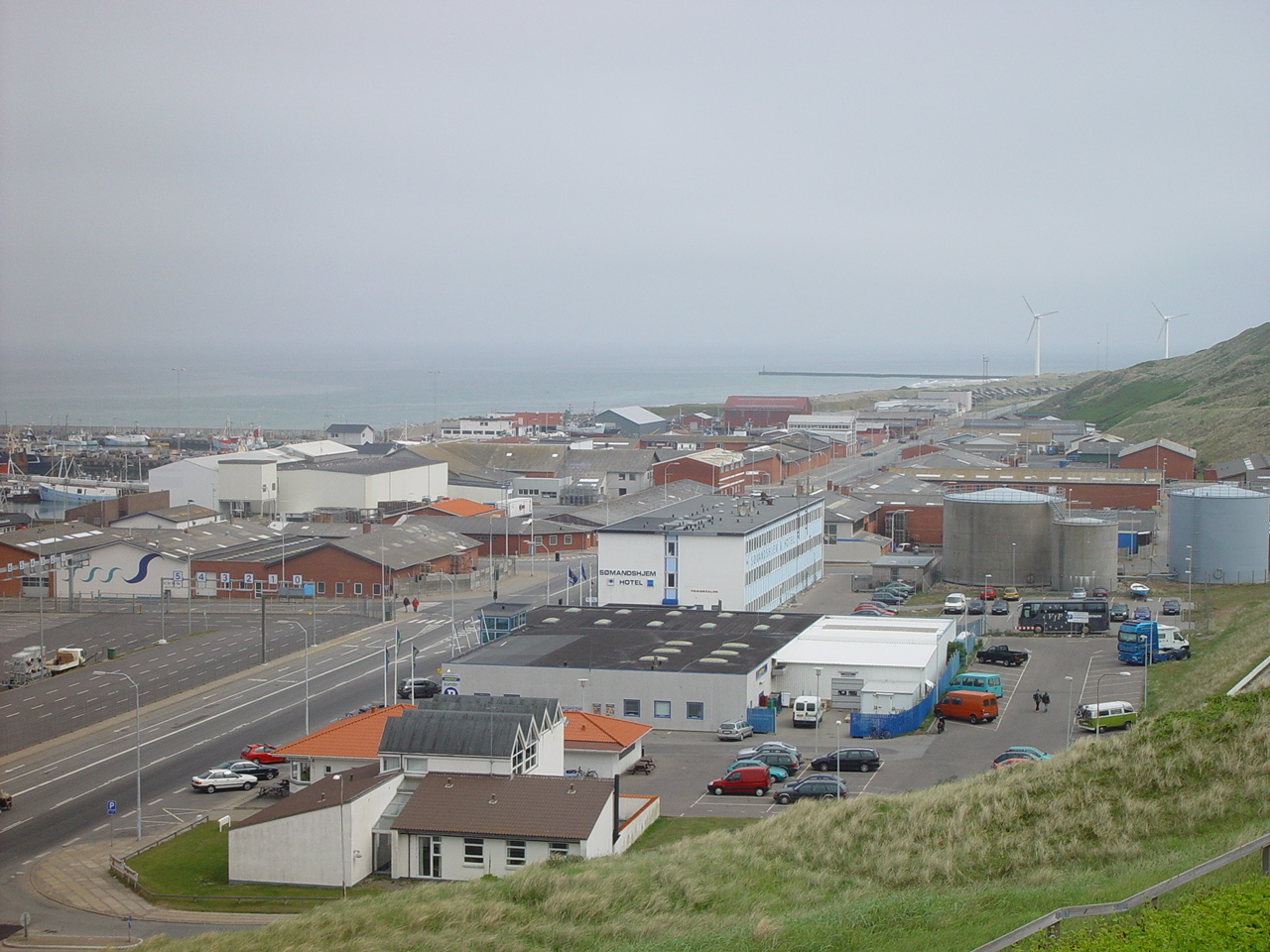 Hanstholm havn Hanstholm.